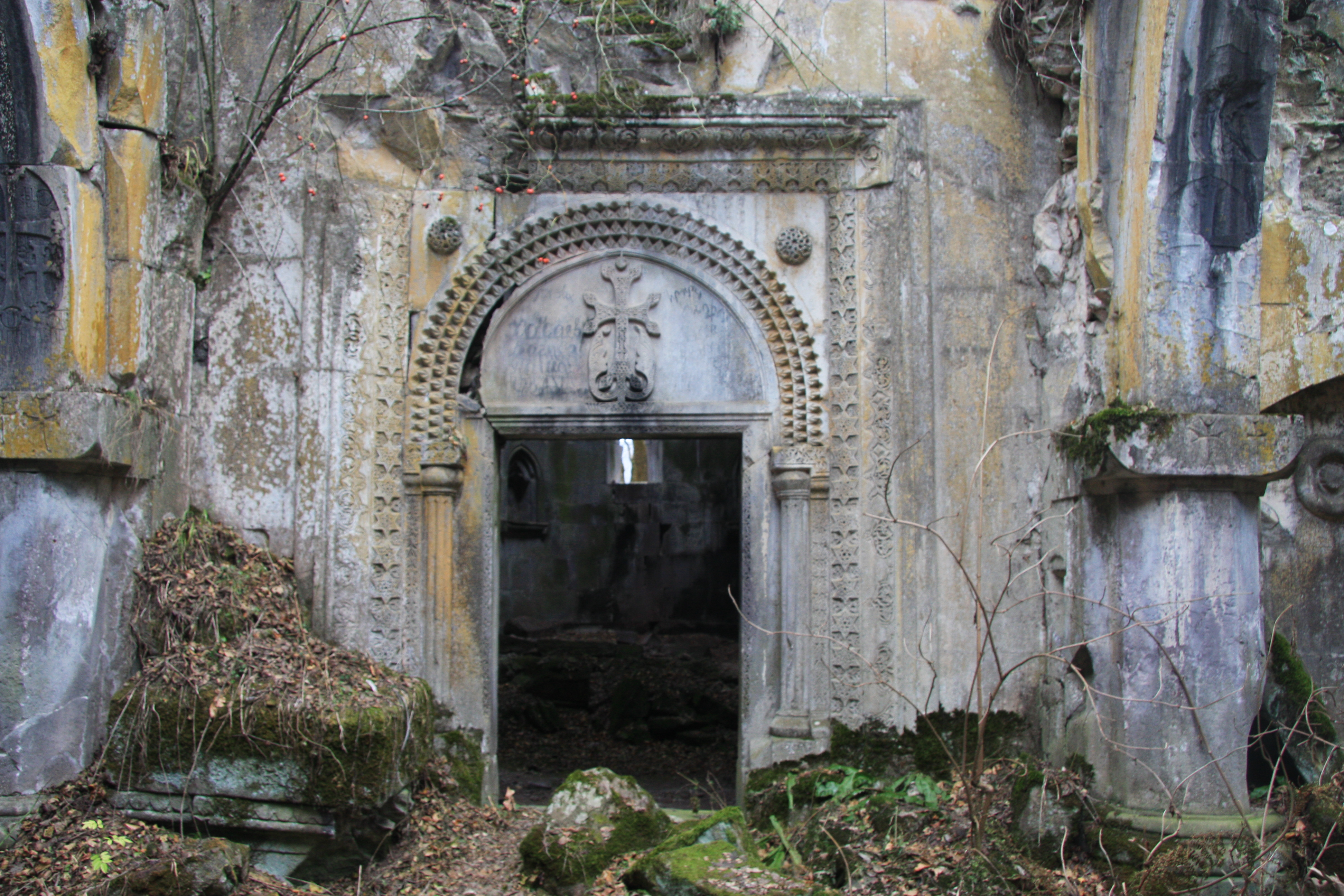 Վանական համալիր «Դեղձնուտ» 8/8.3